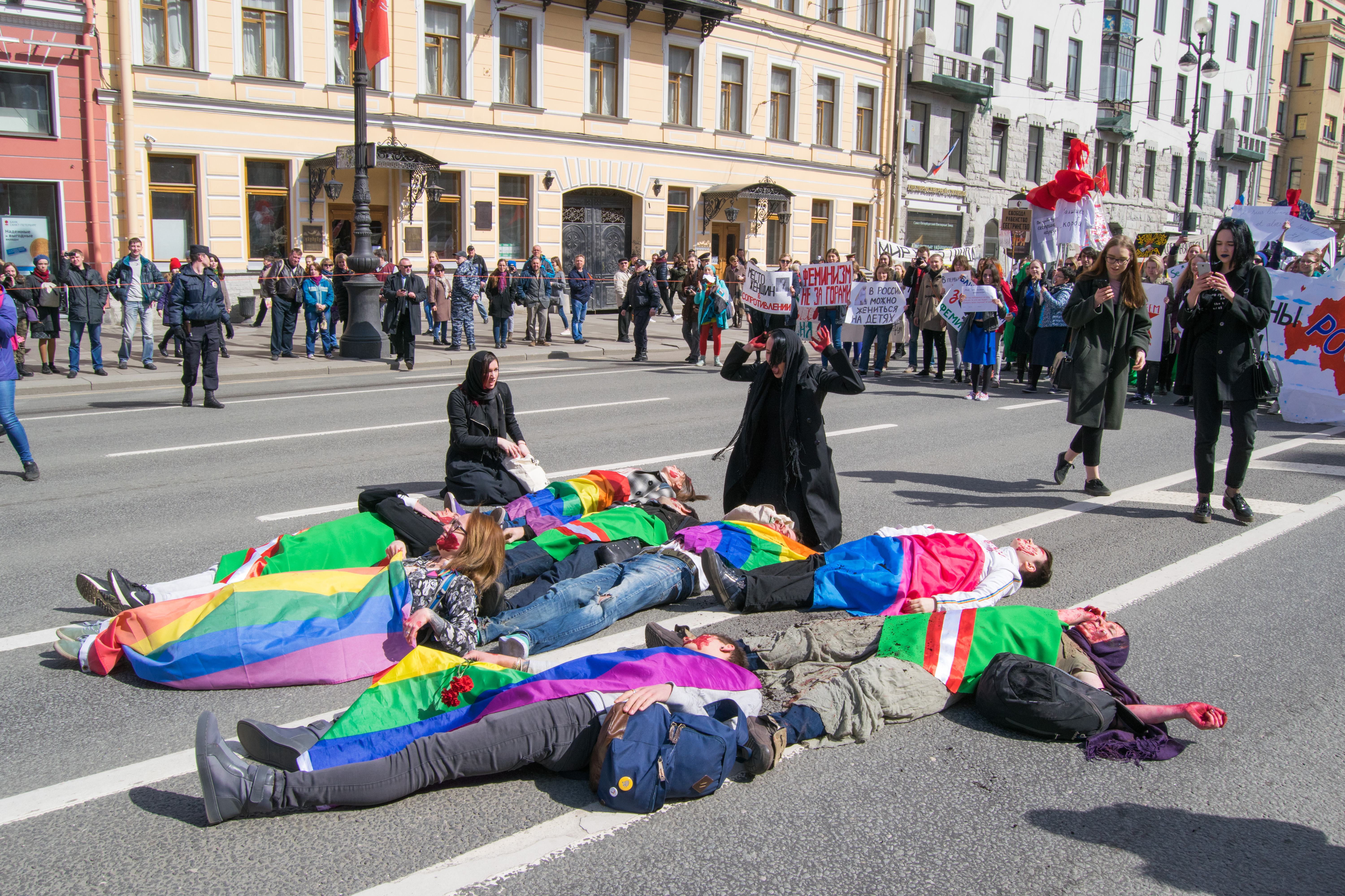 Акция "Чеченские матери оплакивают своих детей", призванная обратить внимание на преследовании геев в Чечне. 1 мая 2017 года. Санкт-Петербург